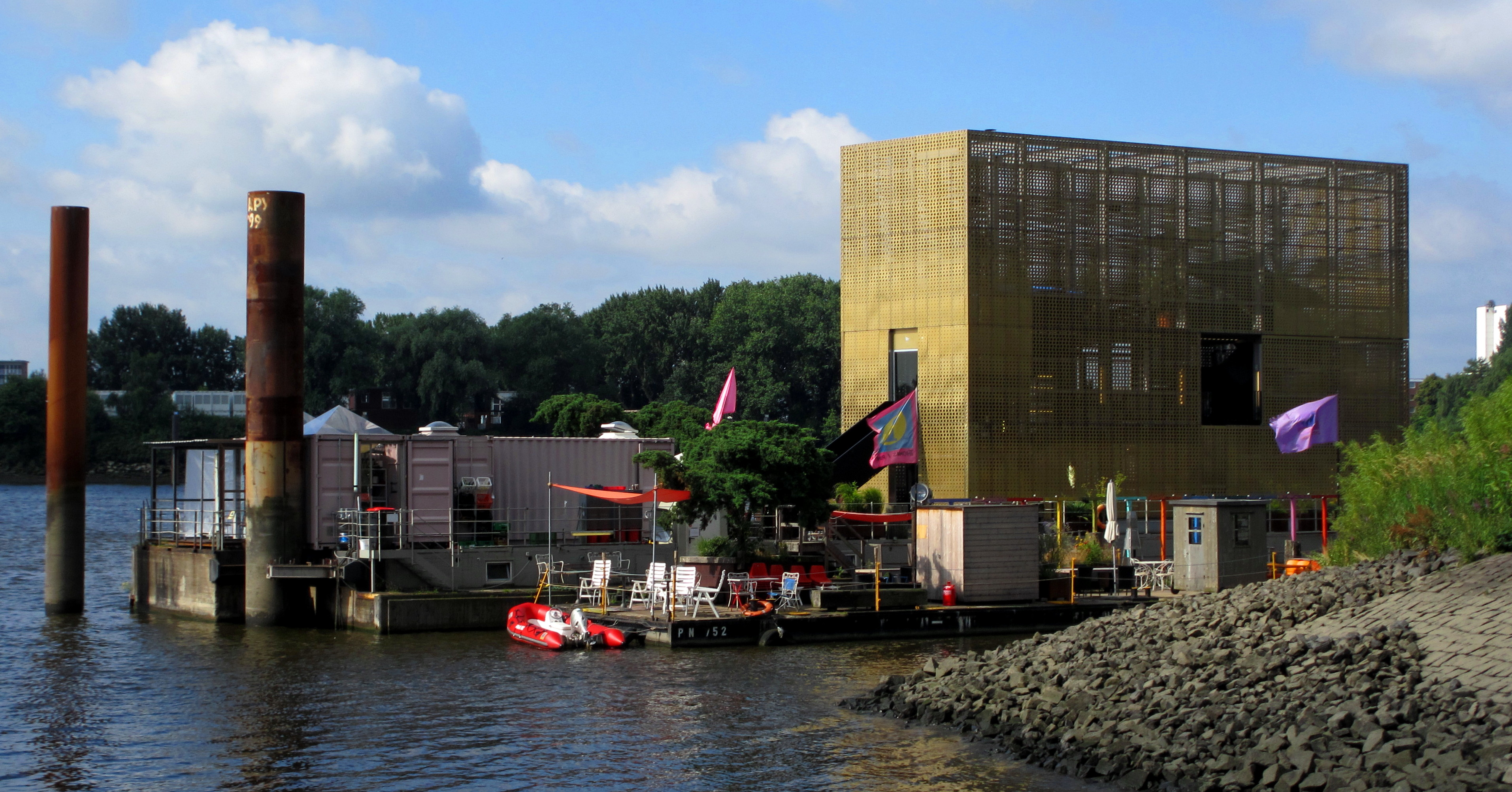 Ponton am Elbpark Entenwerder in Hamburg-Rothenburgsort mit rosafarbenen Schiffscontainern des "Cafés Entenwerder 1" und dem "Goldenen Pavillon". Der Pavillon ist das Werk der Architekten Jan Kampshoff und Marc Günnewig von „modulorbeat“. Sie schufen ihn für die Ausstellung „Skulptur Projekte Münster“ im Jahr 2007. Die begehbare Skulptur mit drei Ebenen ist 16 Meter hoch und elf Meter lang. Die Außenhaut besteht aus goldfarbenem, gelochtem Messing. Das Foto wurde im öffentlichen Raum aufgenommen vom Ufer der Norderelbe aufgenommen. @ Verantwortlicher des Cafés Entenwerder 1: Ihr Kunde werde ich nicht.